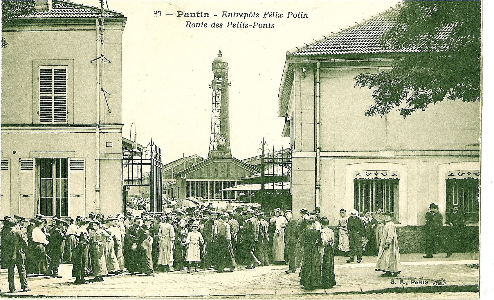 Carte postale ancienne éditée par BF à Paris, N°27PANTIN : Entrepôts Félix Potin - Route des Petits Ponts